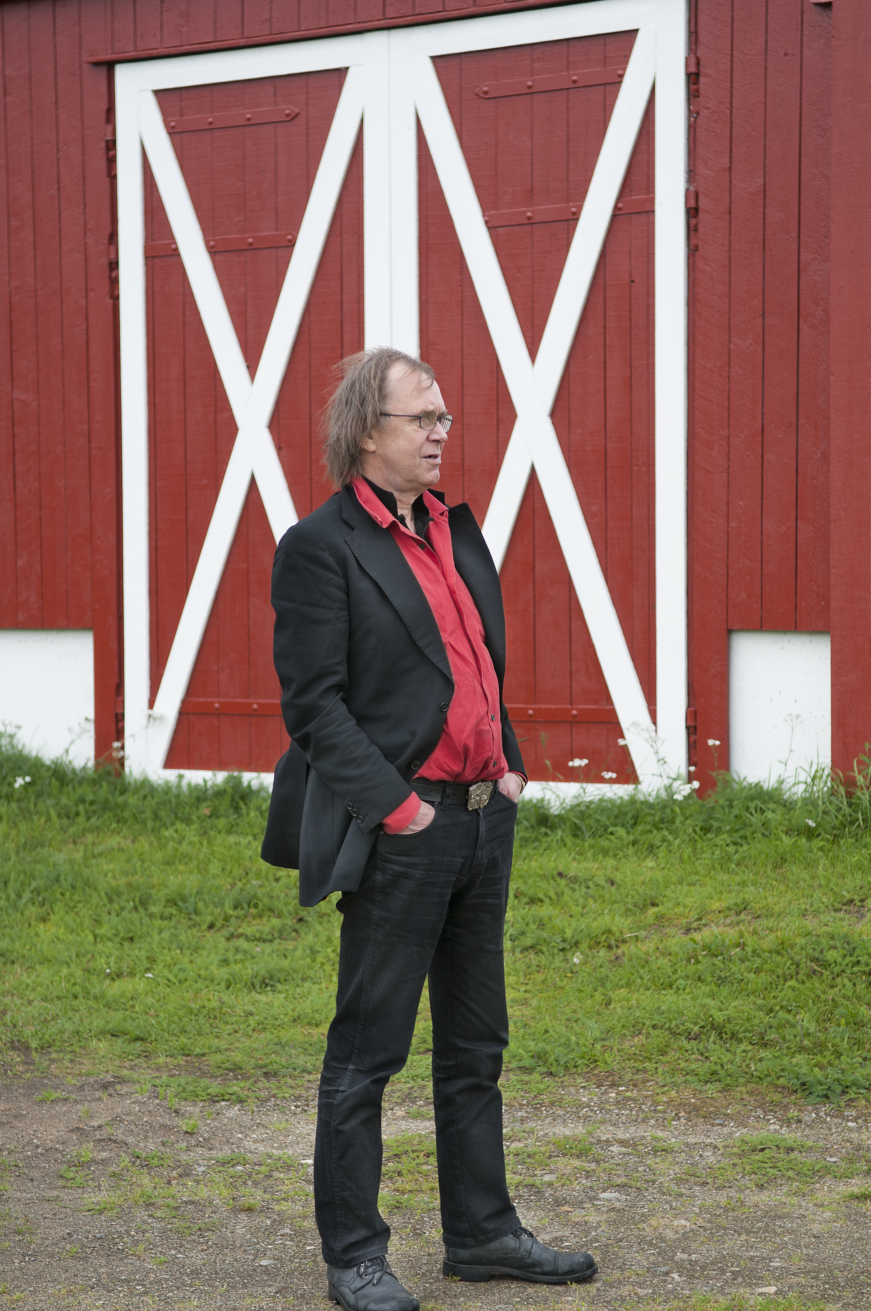 Øystein Meier Johannessen, fotografert hjemme i Hemnes den 14. september 2013